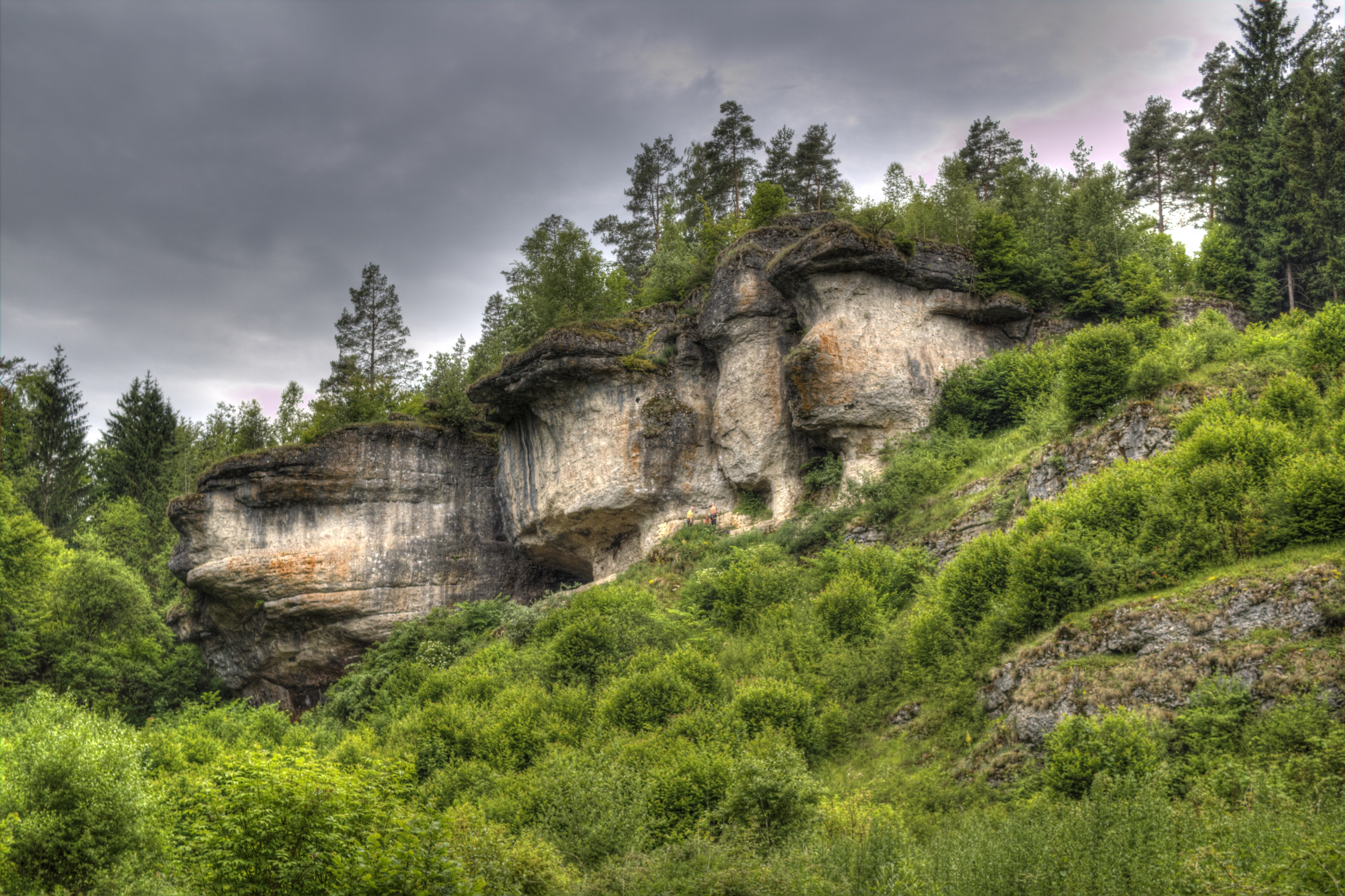 HDR des Felsmassivs Klinge. Beliebter Kletterfelsen im Kleinziegenfelder Tal